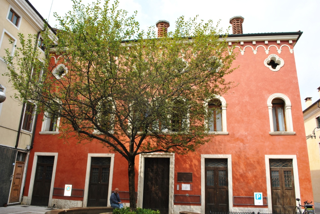 Biblioteca Civica R. Bortoli This is a photo of a monument which is part of cultural heritage of Italy.